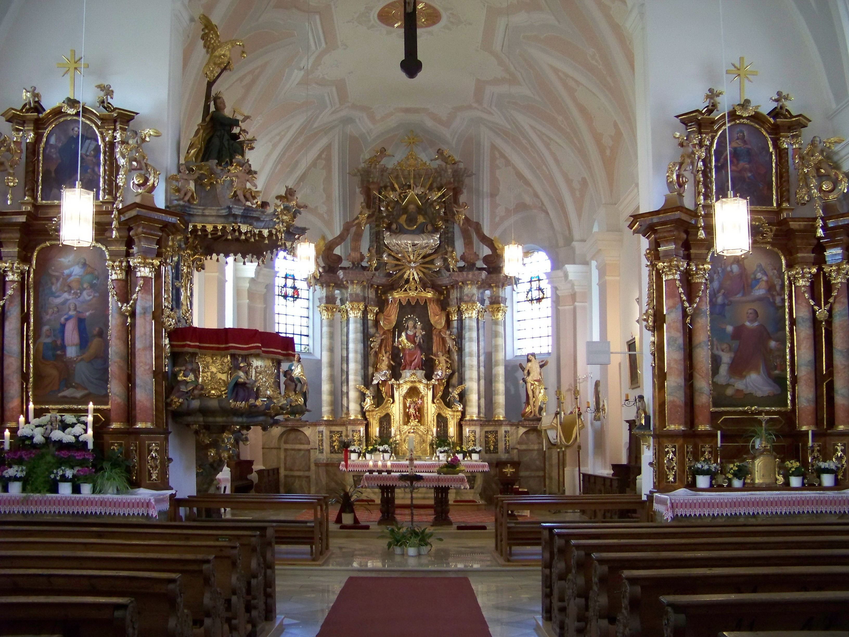 Mallersdorf-Pfaffenberg. Westen 82. Katholische Pfarrkirche Mariae Opferung. Das aus vier Achsen gebildete Langhaus und der Chor werden im wesentlichen durch die 1914 mit neoklassizistischem Stuck überformte Barockarchitektur aus der Zeit um 1740 bestimmt.